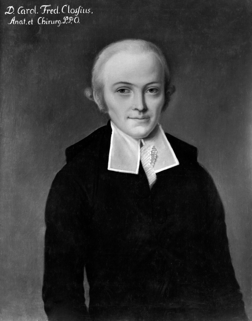 Carl Friedrich Clossius, Anatom und Chirurg. Gemälde in der Professorengalerie Tübingen